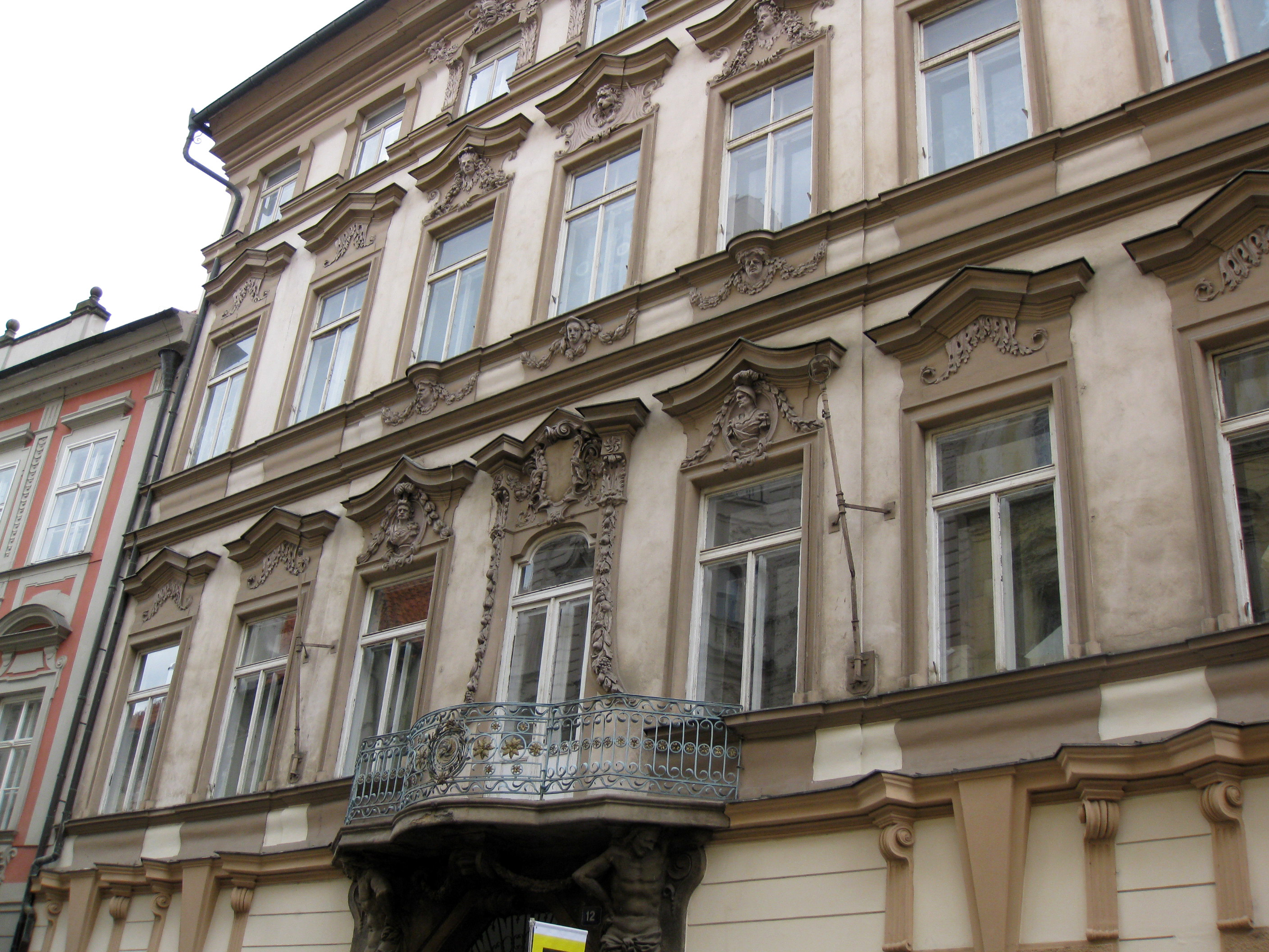 Palác Hrzánů z Harasova (Staré Město), Praha 1, Celetná 558/12, Staré Město